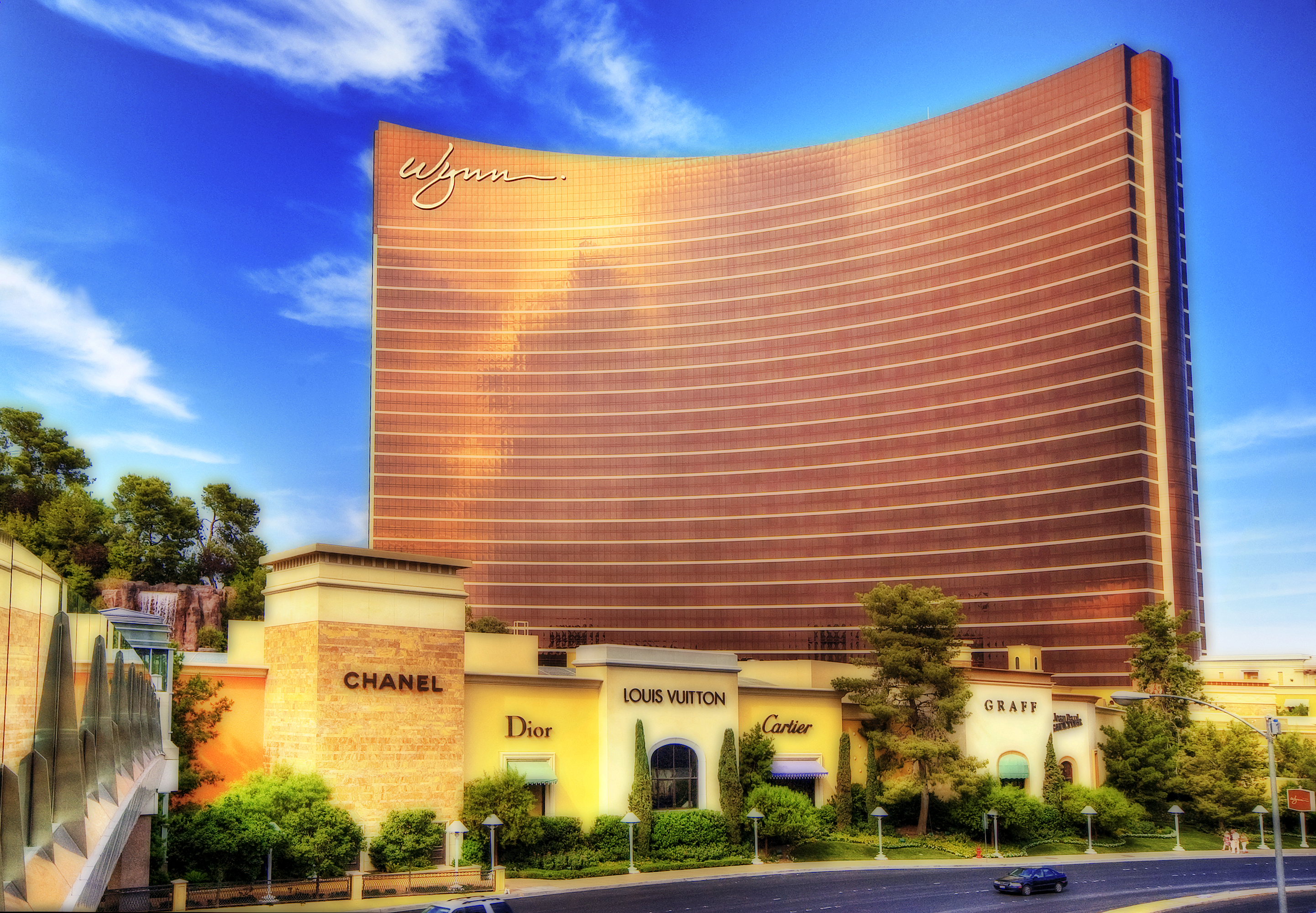 Hotel Wynn en Las Vegas, Nevada